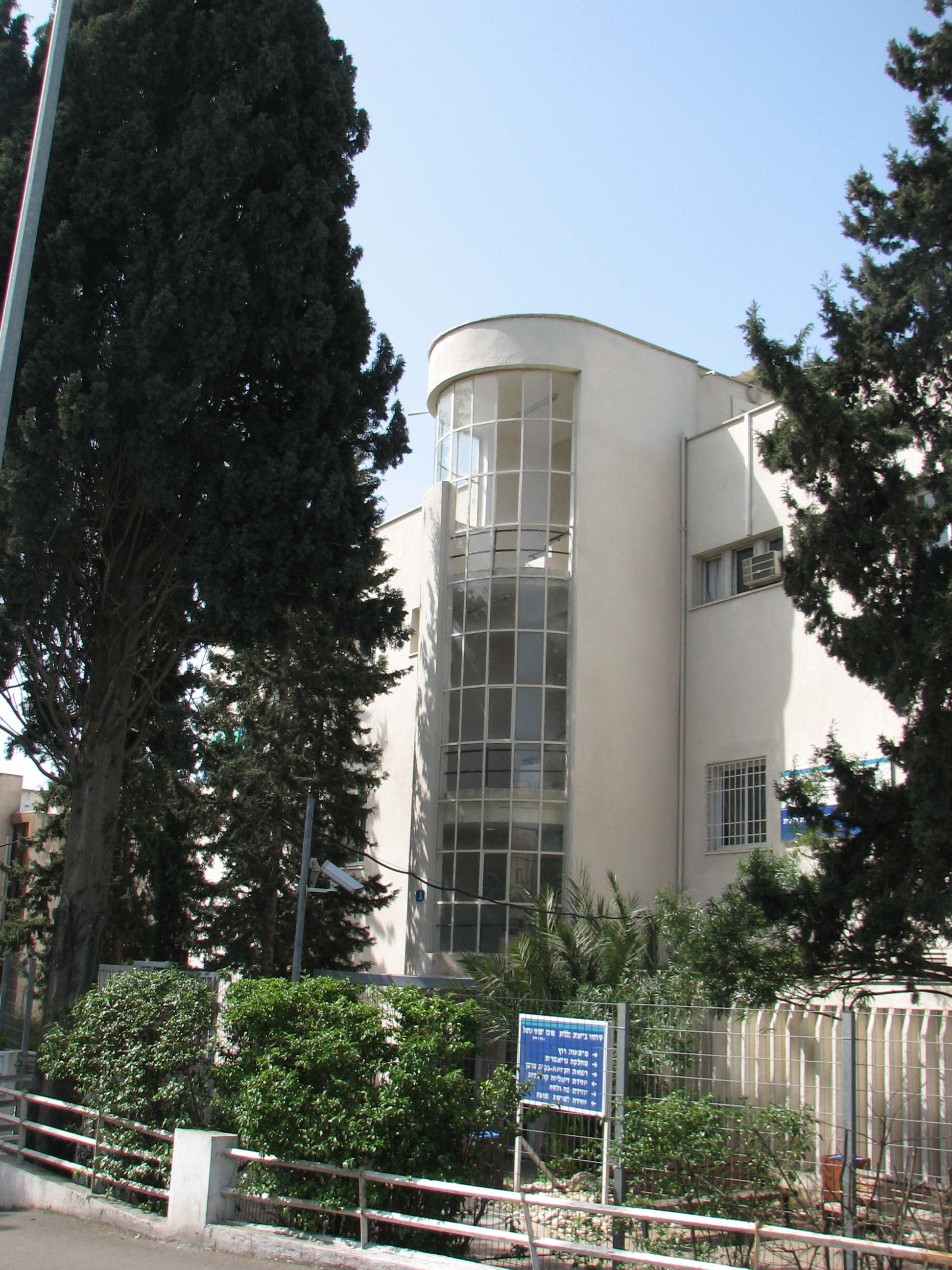 Carmel Medical Center, Haifa, Israel בית חולים כרמל, שכונת אחוזה על הר הכרמל בחיפה בית חולים כרמל - המבנה הישן שנבנהבשנת 1935